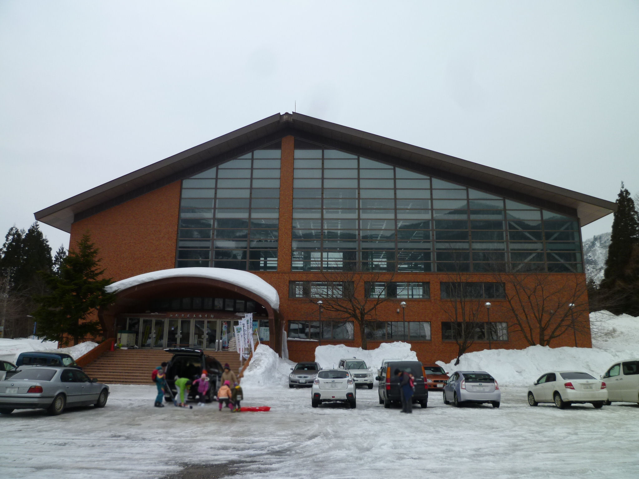 山形市蔵王体育館。山形市蔵王温泉に所在。